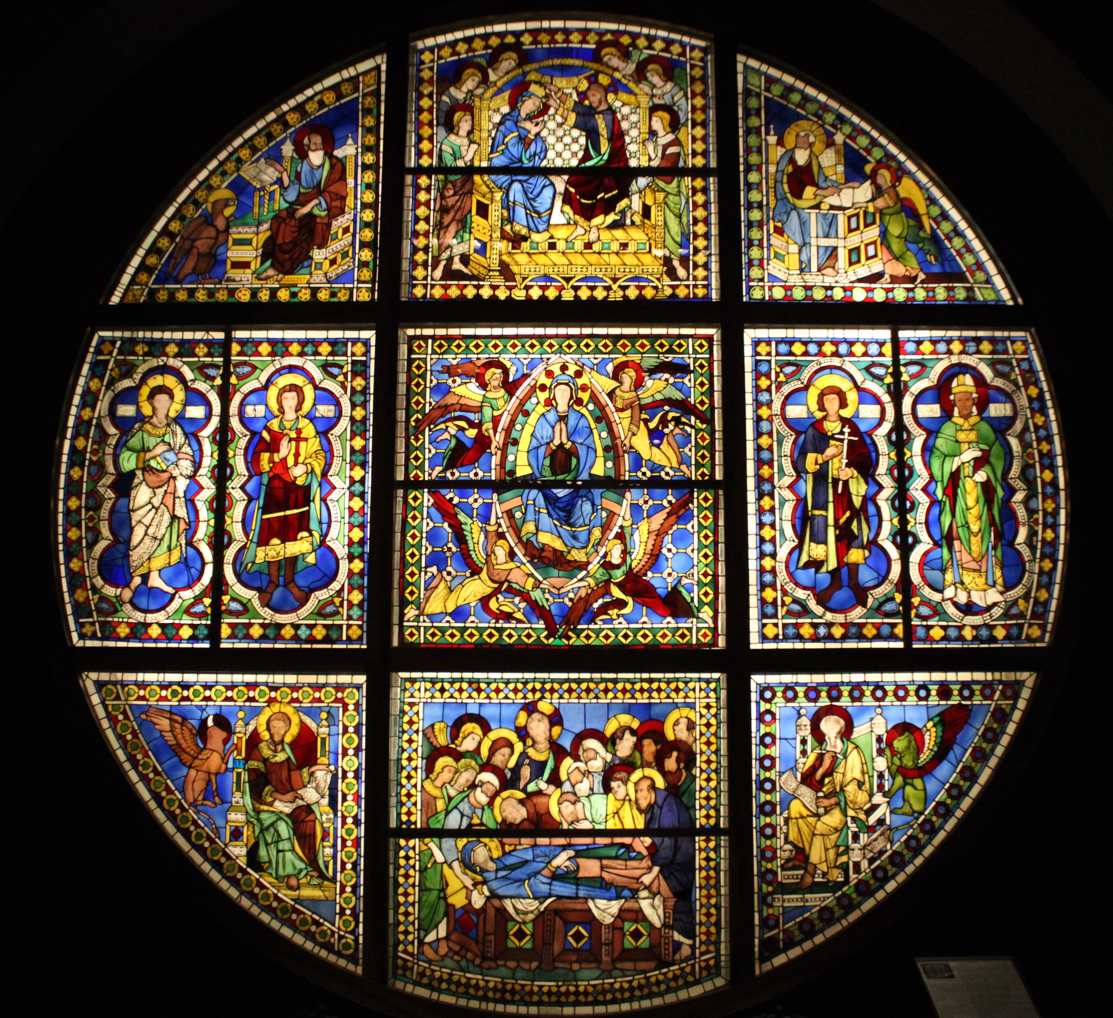 Duccio. Rosetón de la catedral de Siena.